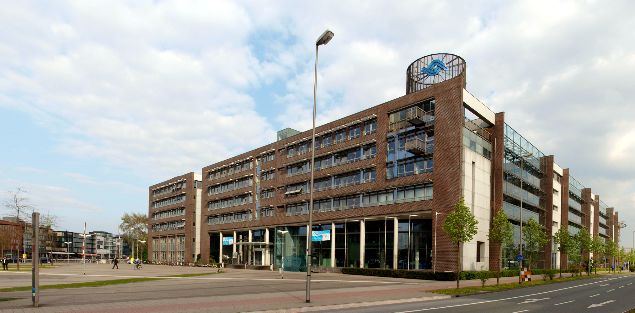 Hauptsitz der Stadtwerke Münster am Hafen